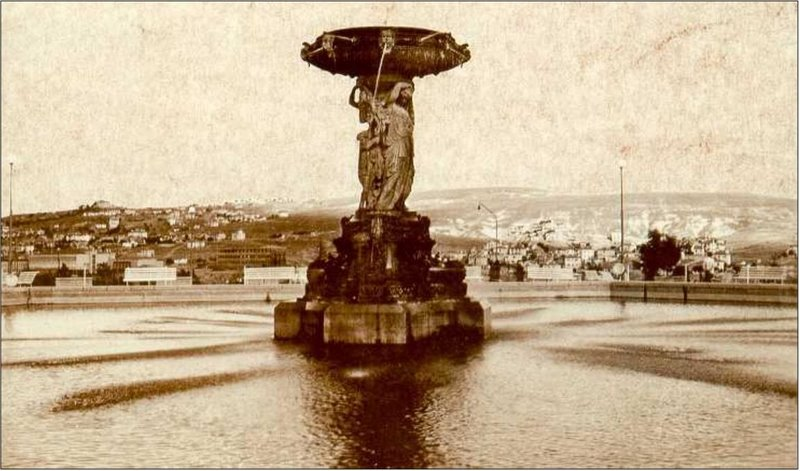 Su Perileri heykeli, 1925-30 yıllarında Kızılay'da yer almıştır. Ankara'ya hediye olarak gelen bronz heykelin Viyana Belediyesi veya Napoli Belediyesi tarafından yaptırıldığına dair farklı rivayetler vardır.[1] İlk yeri Hacettepe Parkı'dır, sonra Kızılay Meydanı, sonra Evkaf Oteli karşısında şimdiki Gençlik Parkı'nın olduğu çukurluğa, sonra tekrar Hacettepe Parkı'na, sonra Tandoğan Meydanı'na yerleştirildi. 1992 yılında Ankaray istasyonu inşaatı sırasında Tandoğan Meydanı'ndan kaldırıldı ve Belediye Park ve Bahçeler Müdürlüğü'nün Yenimahalle deposuna götürüldü. 2008 yılında Hürriyet gazetesi muhabirleri tarafından yeniden bulunduktan sonra, hasar gören kısımları heykeltraş Metin Yurdanur tarafından restore edildi ve heykel nihayet 20 Aralık 2010 tarihinde Cer Modern'in önüne yerleştirildi.[2] ↑ Gezenadam: "Susuz Su Perileri" ↑ Hürriyet: "İnat değil kent kazandı" (20-12-2010)